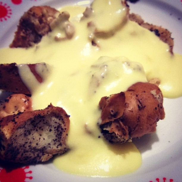 Mákos guba - diós guba